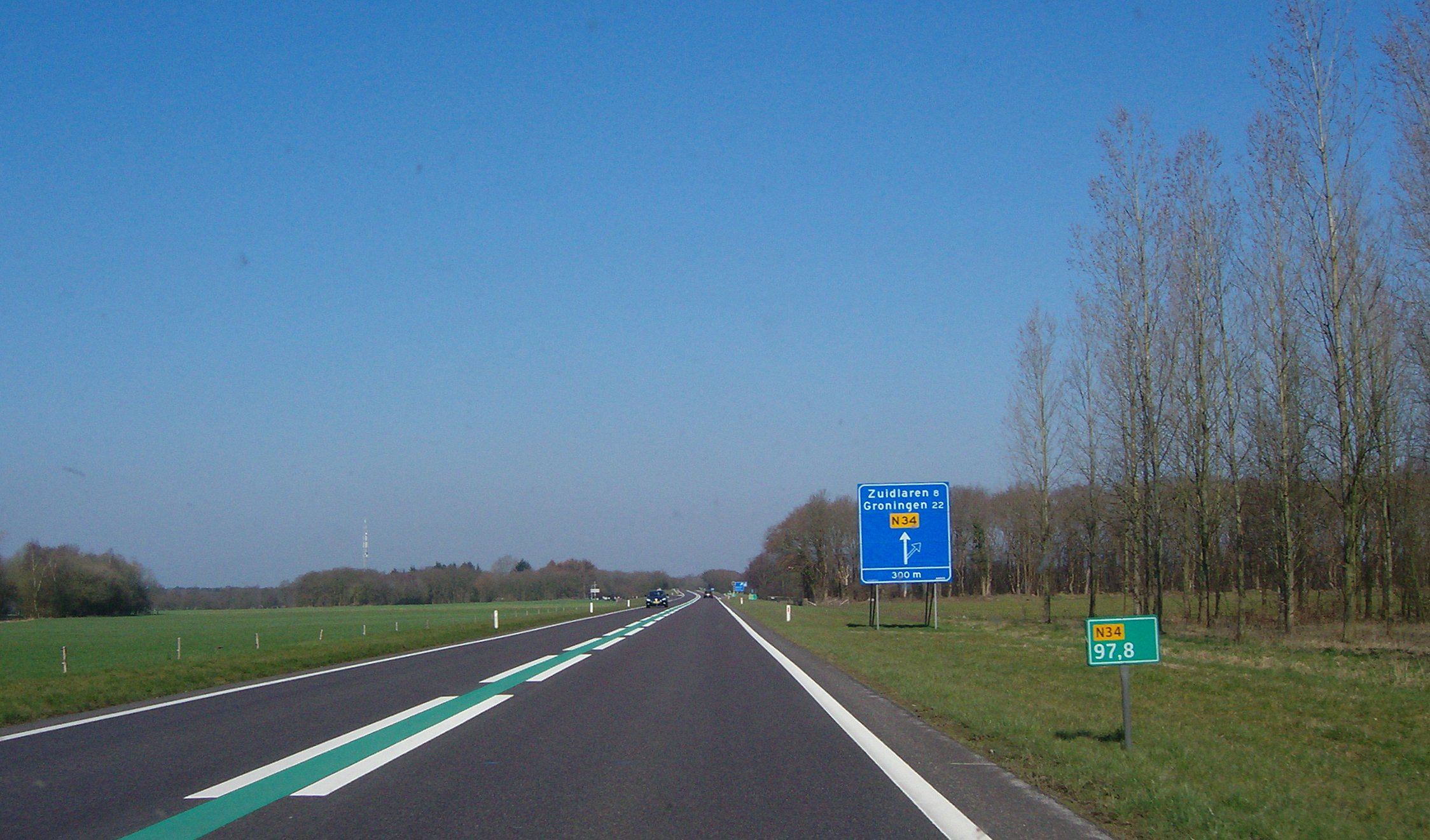 N34 bij afrit Annen